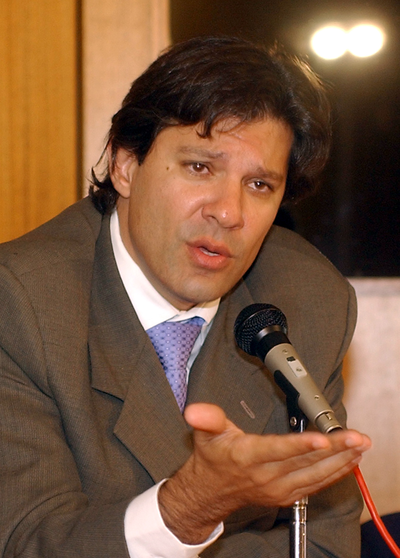 Brasília - O ministro da Educação, Fernando Haddad, apresenta catálogo nacional dos cursos superiores de tecnologia.